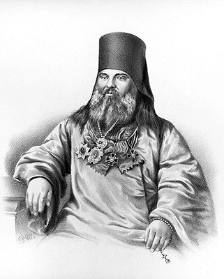 Архиепископ Антоний (в миру Александр Иванович Павлинский; 29 ноября 1801, село Притыки, Варнавинский уезд, Костромская губерния — 29 марта 1878, Владимир) — епископ Русской православной церкви, архиепископ Владимирский и Суздальский. Литография. Сер. XIX в. (ГИМ)